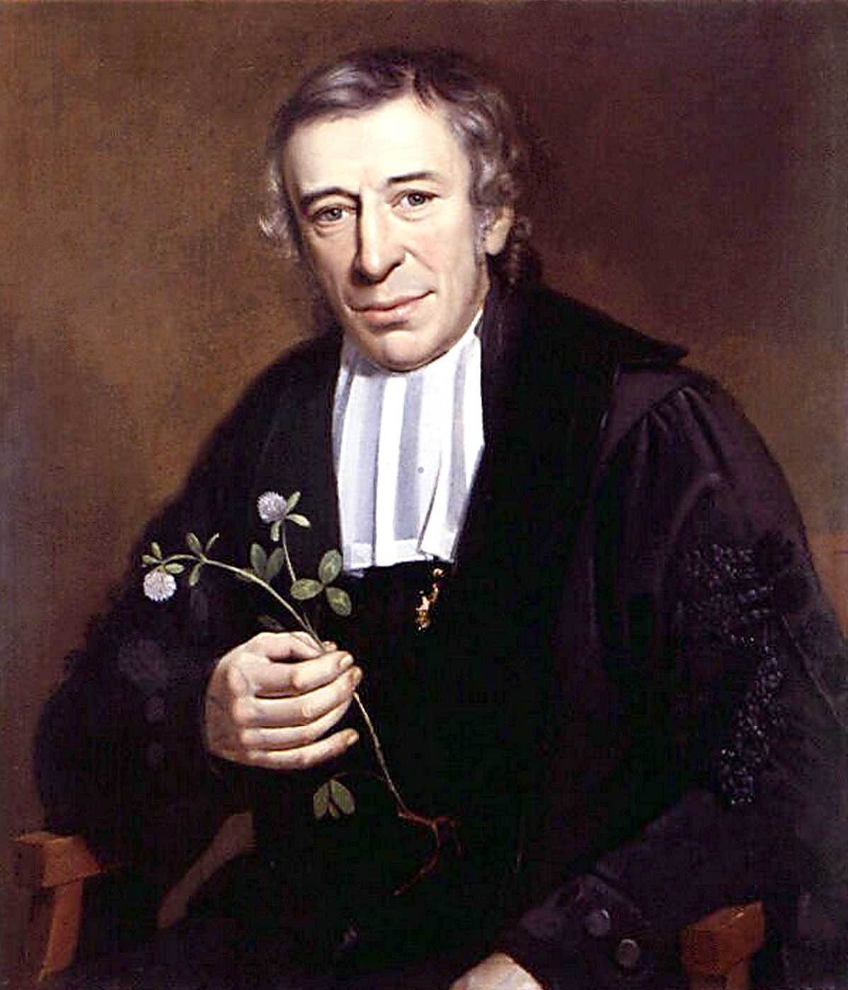 Portet van Jan Kops